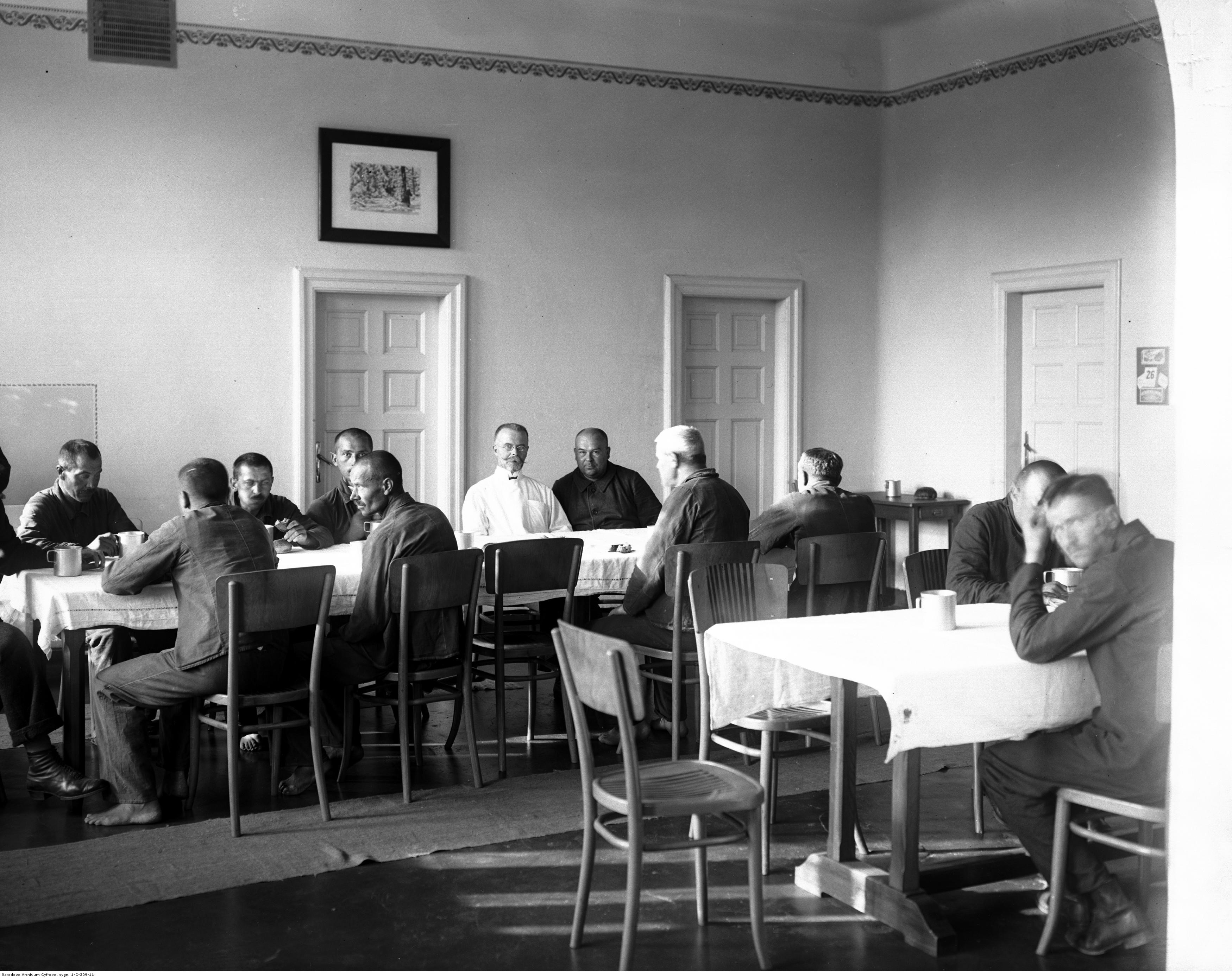 Zakład dla Nerwowo i Psychicznie Chorych w Kobierzynie: Chorzy w jadalni podczas spożywania posiłku. Wśród chorych widoczny dyrektor szpitala doc. dr med. Juliusz Morawski (w fartuchu).